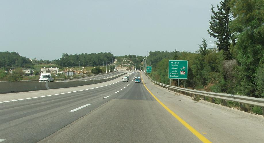 כביש 70 בואכה צומת סומך. צילם דוד שי.